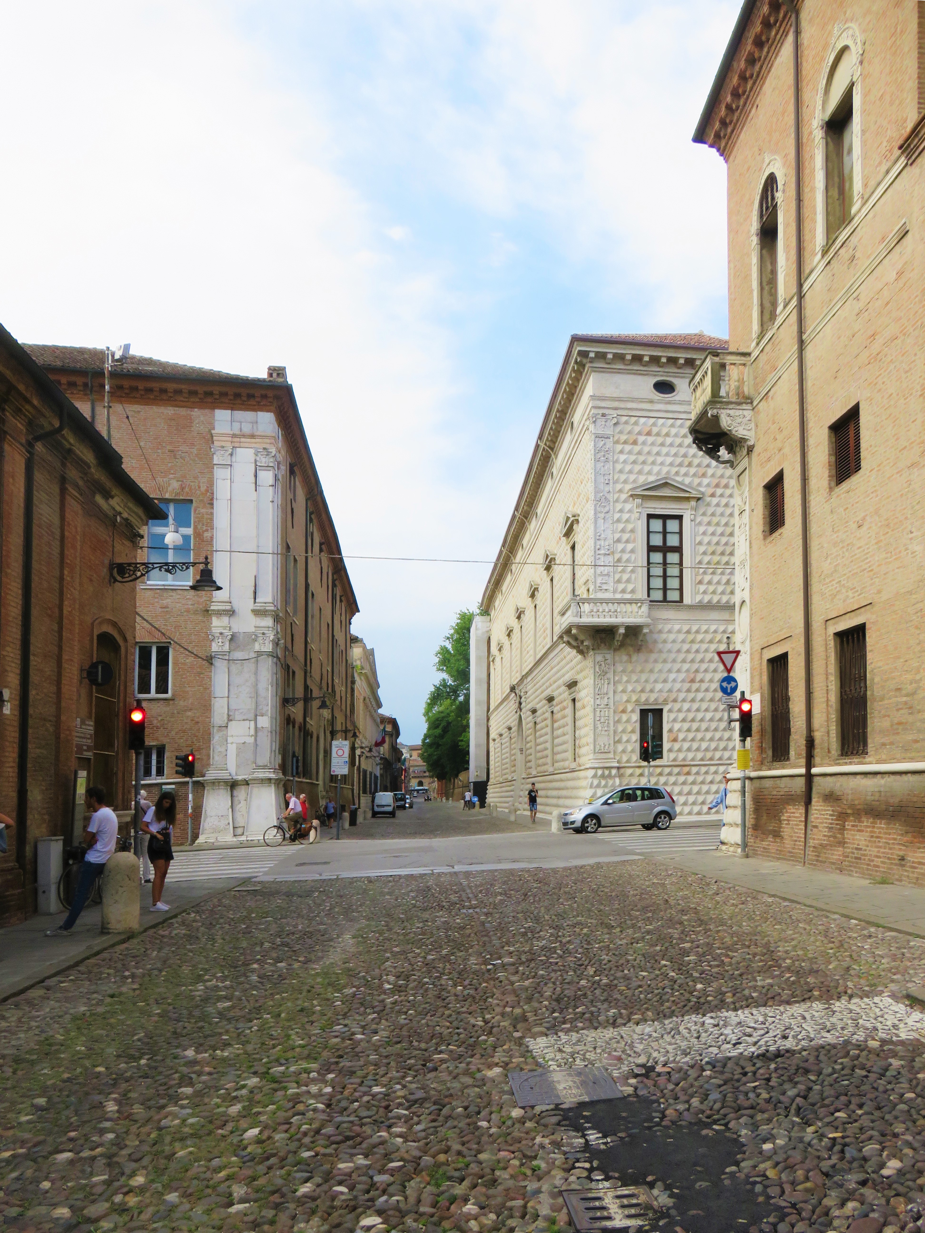 Palazzo dei Diamanti, Palazzo Prosperi Sacrati e Palazzo Turchi di Bagno